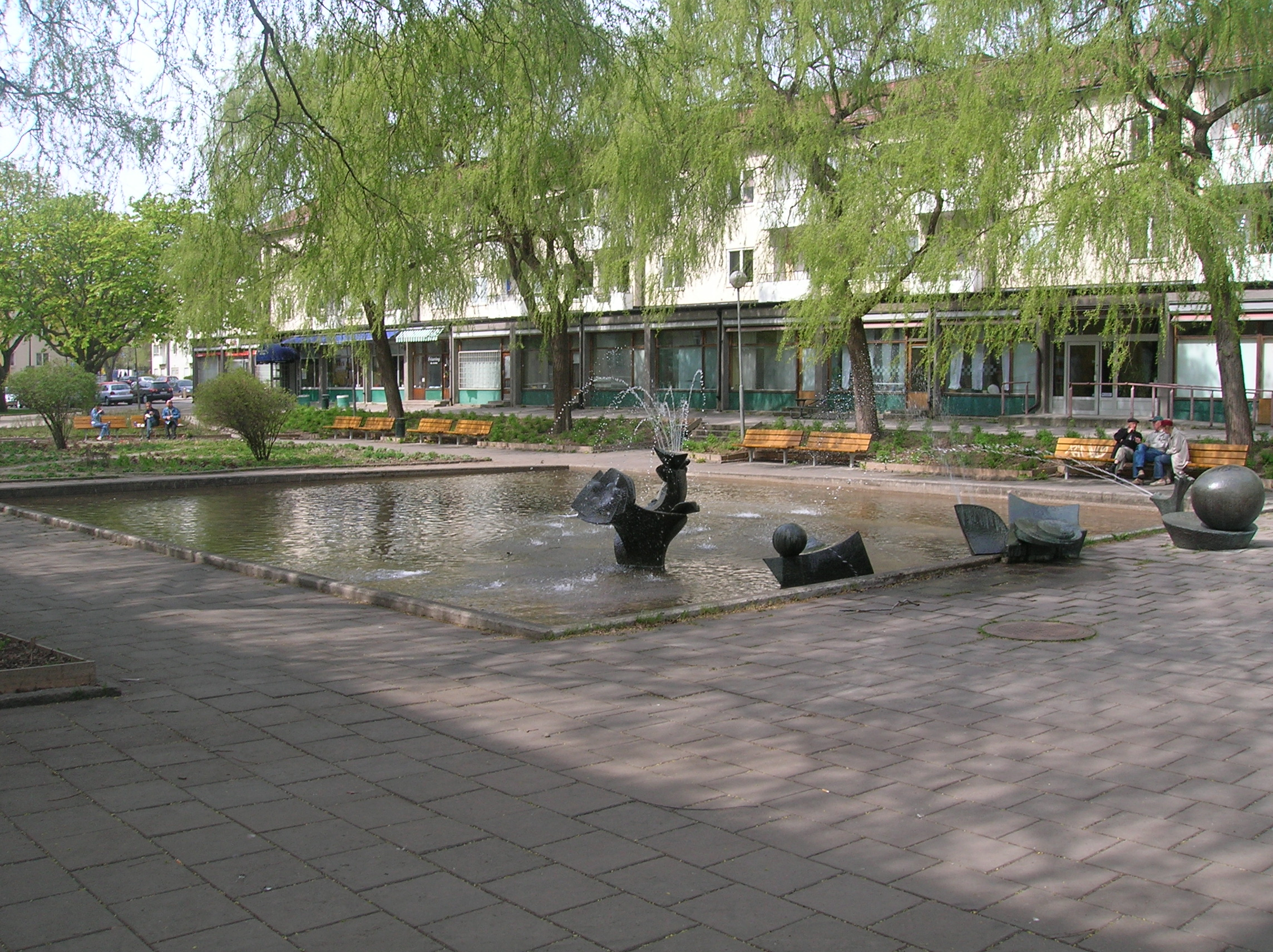 Dammen vid Skälderviksplan i Årsta. Konstverket heter Vågen och är gjort av konstnären Bengt Amundin.